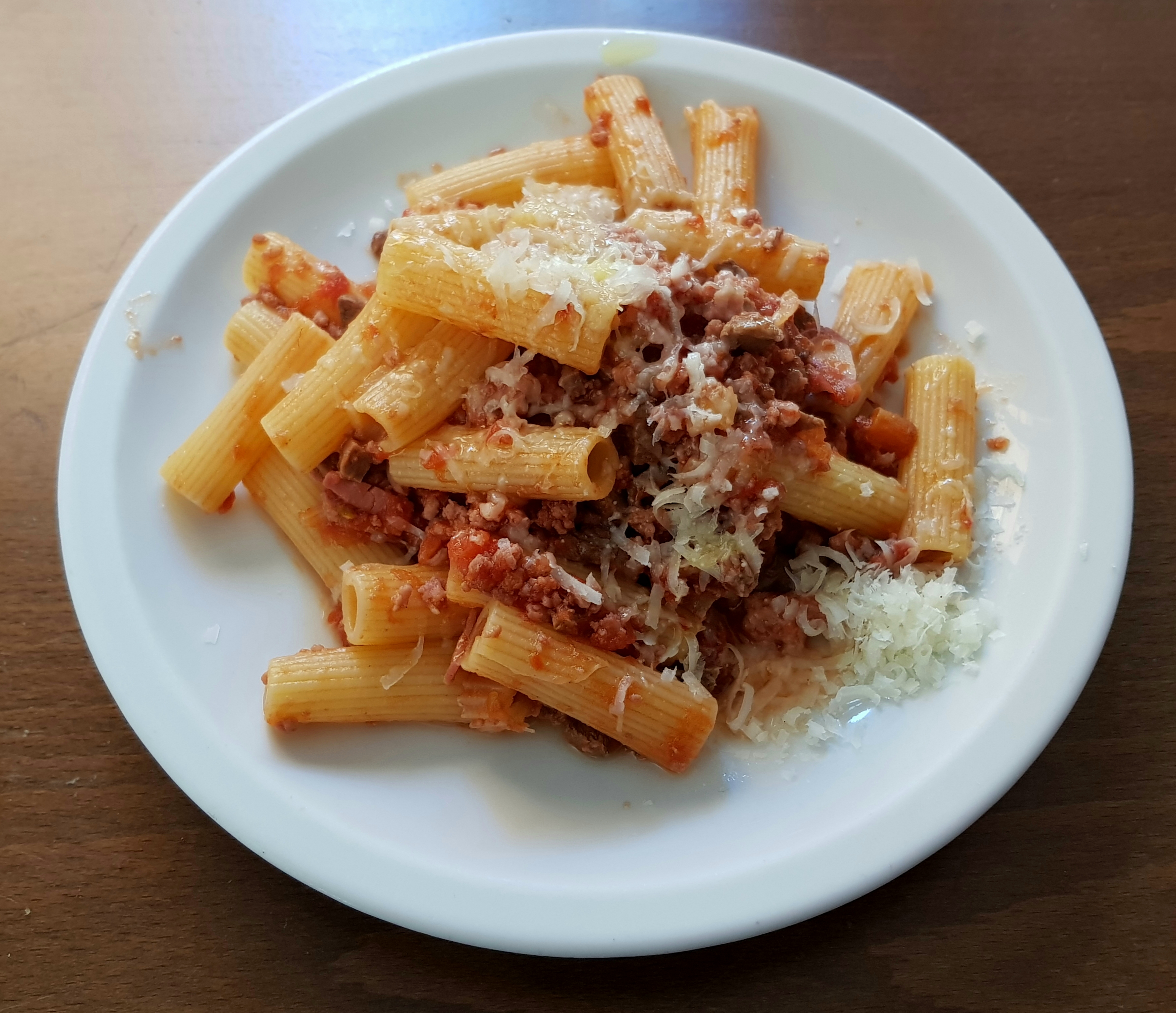 Rigatoni al ragù di vitella, restaurant italià al carrer de la Creu, València.